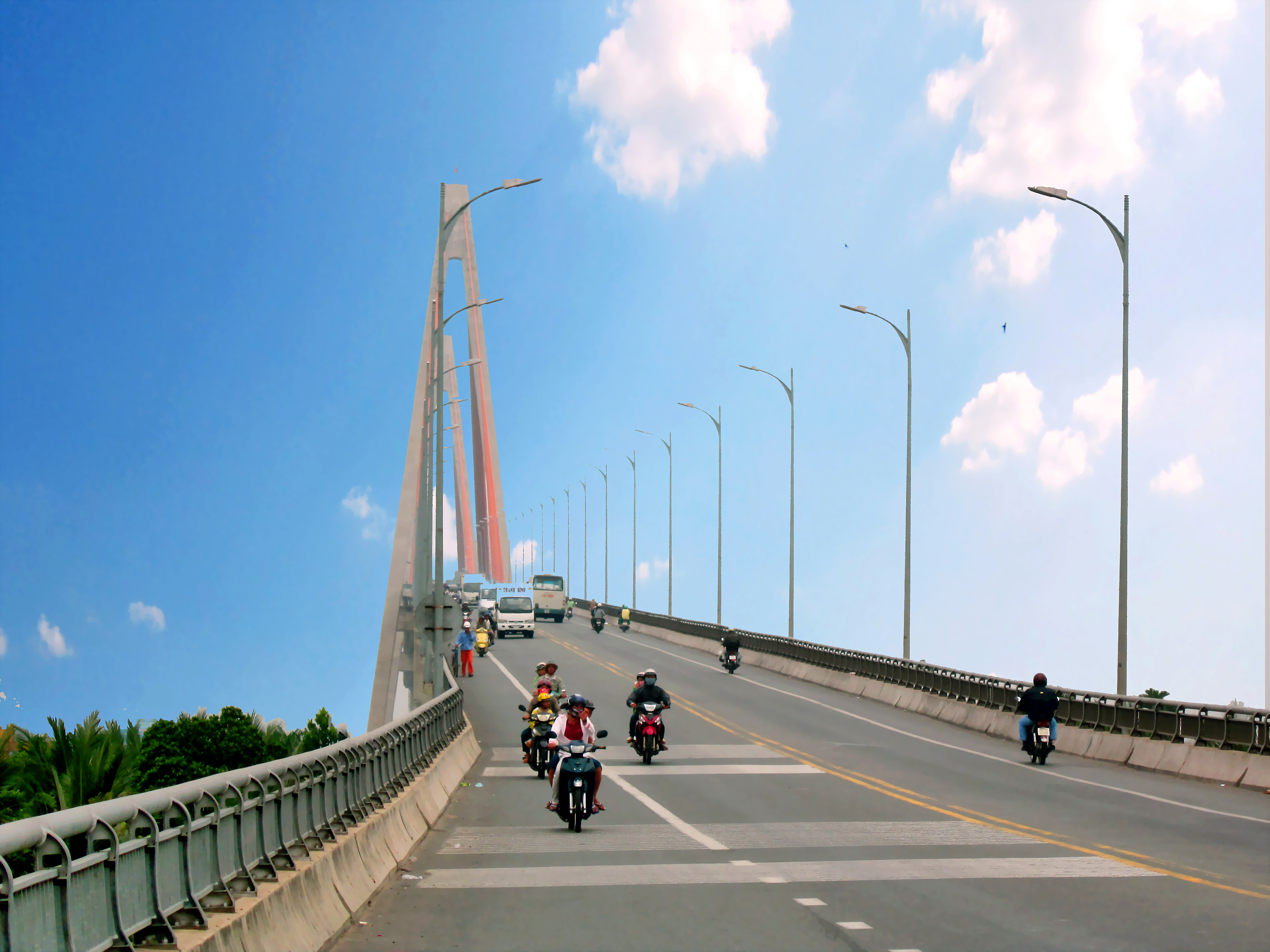 Dốc cầu Rạch Miễu bên bờ thuộc Bến Tre, Việt Nam.